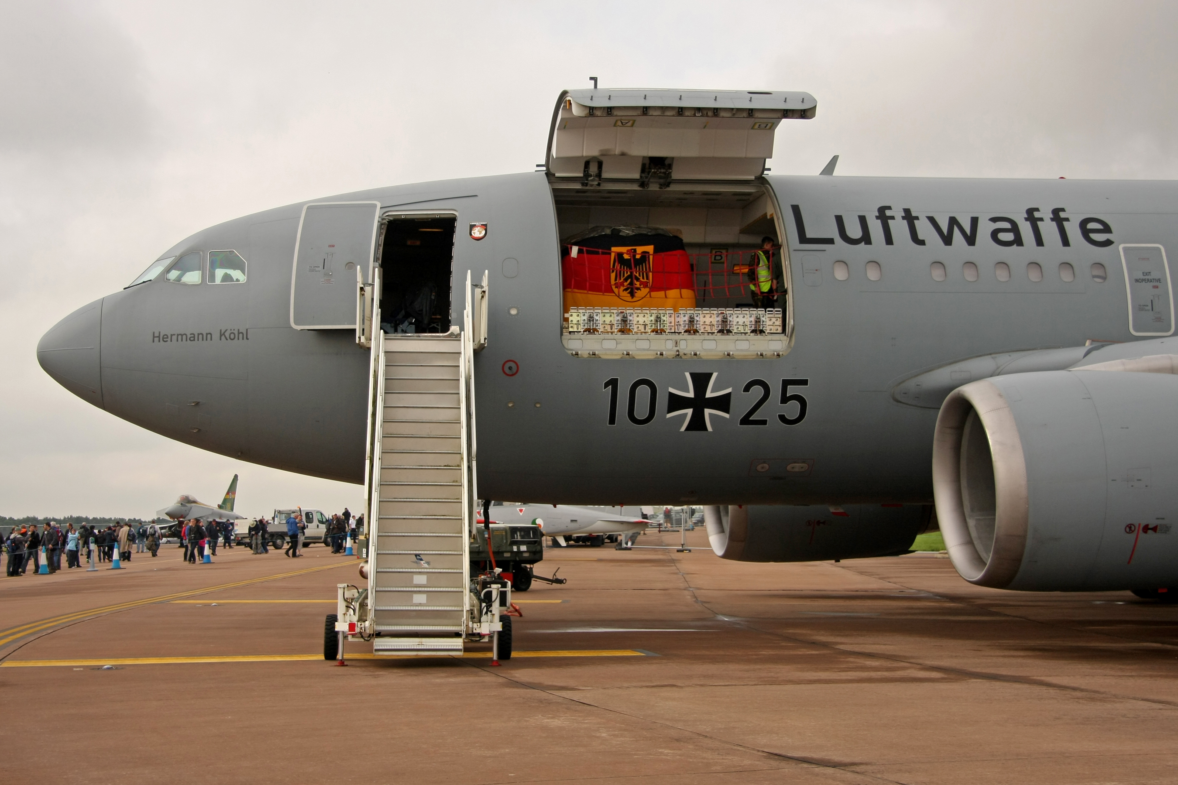 Airbus A310MRTT 2